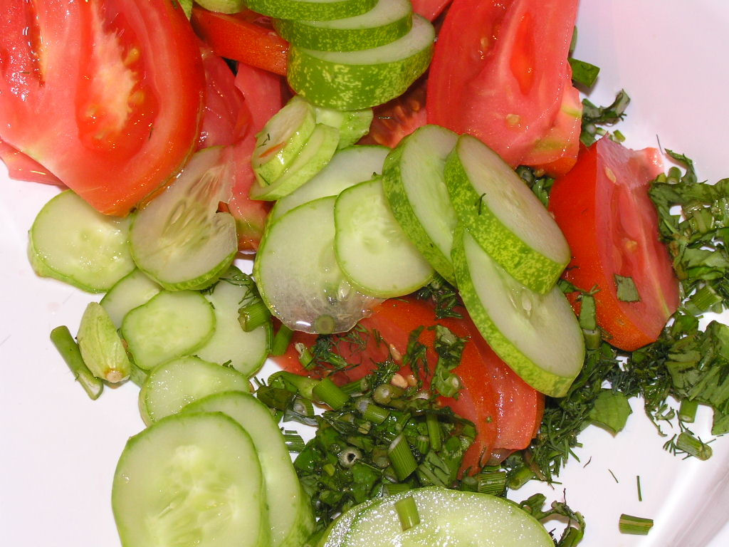 Fresh salad